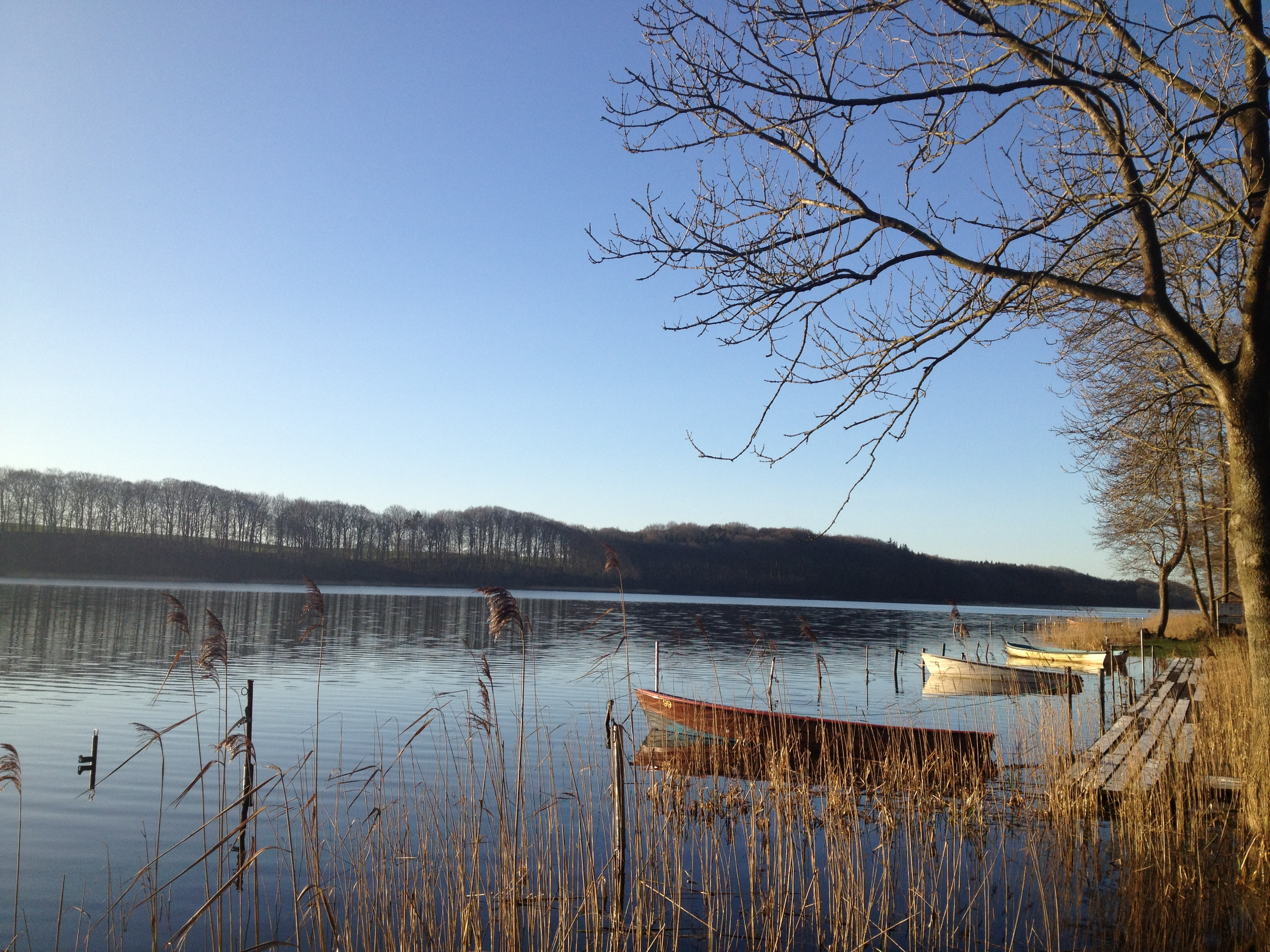 Langsee, Süderfahrenstedter Seite